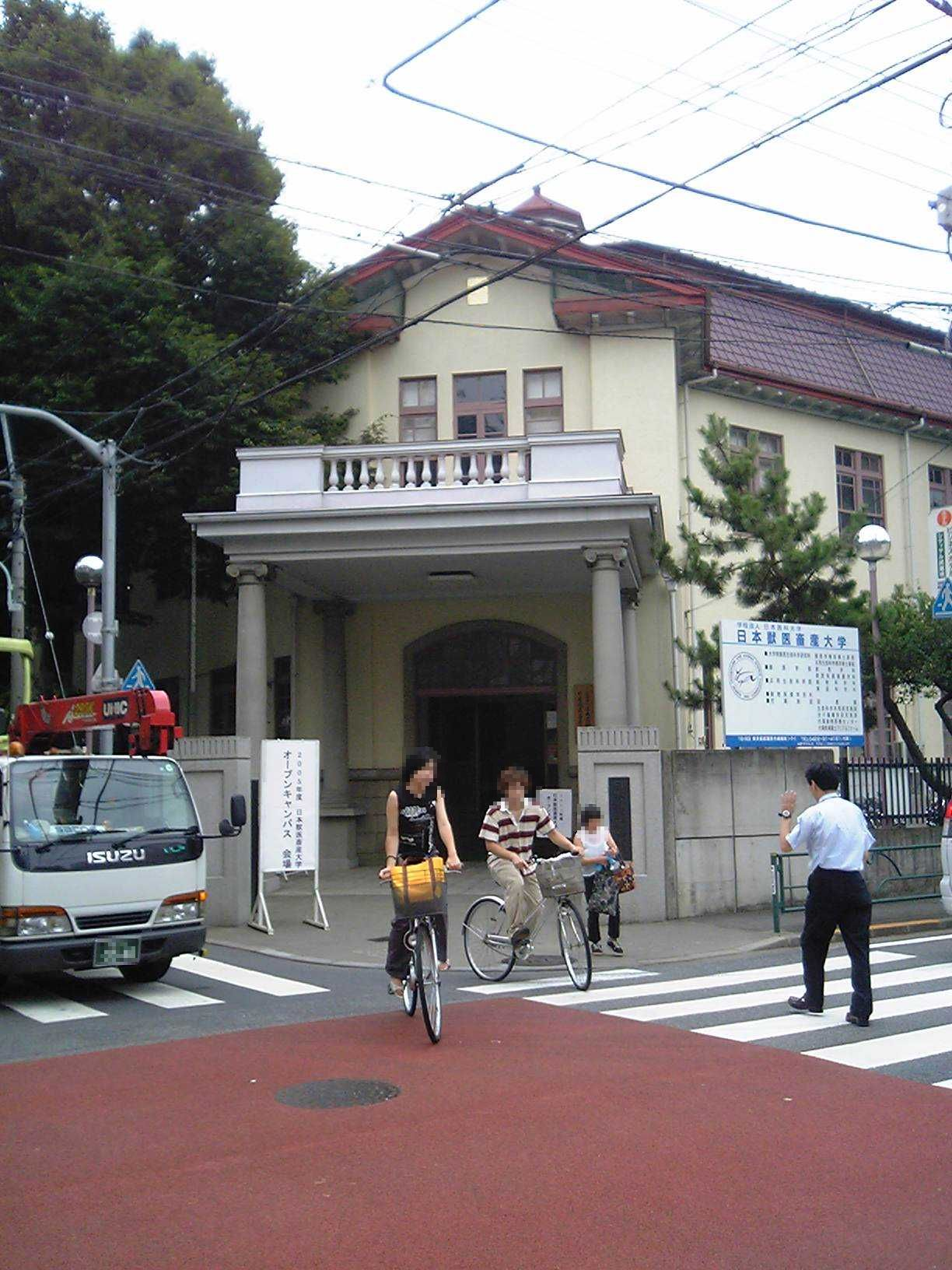 日本獣医畜産大学（現・日本獣医生命科学大学）